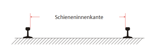 Skizze zum Begriff Schieneninnenkante